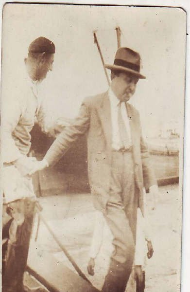 Albeto Aybar Augier. Desembarcando de San Julian.